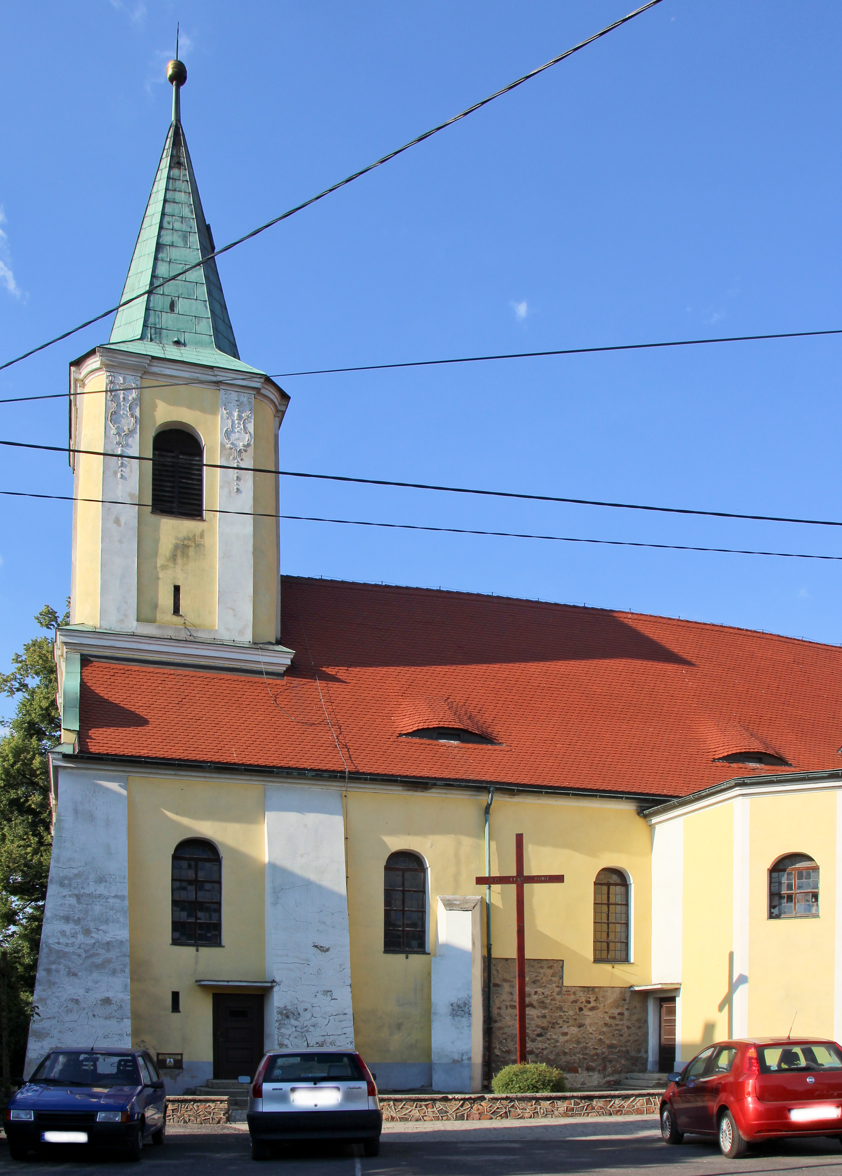 Ścinawa Mała – rzymskokatolicki kościół parafialny p.w. Nawiedzenia NMP, XIV, XVIII, 1896.